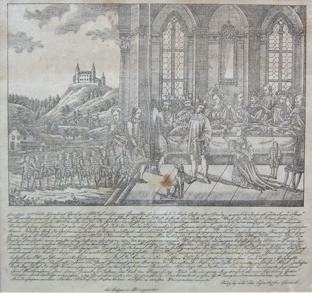 Welfensage. Kupferstich, 18. Jahrhundert. Blatt ca. 30 x 31 cm.